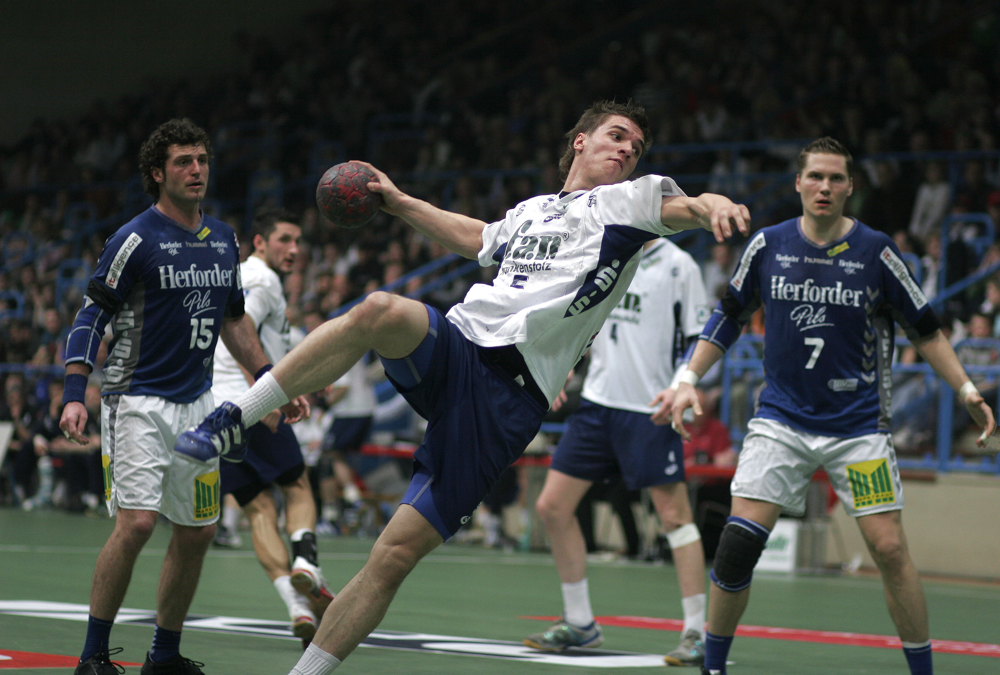 Hannes Volk, Spieler des TV Großwallstadt, am 24. März 2007 im Spiel gegen den TBV Lemgo in der Aschaffenburger Unterfrankenhalle